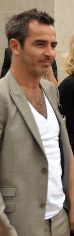 Arnaud Henriet au festival de Cannes 2011 pour le film Polisse de Maïwenn